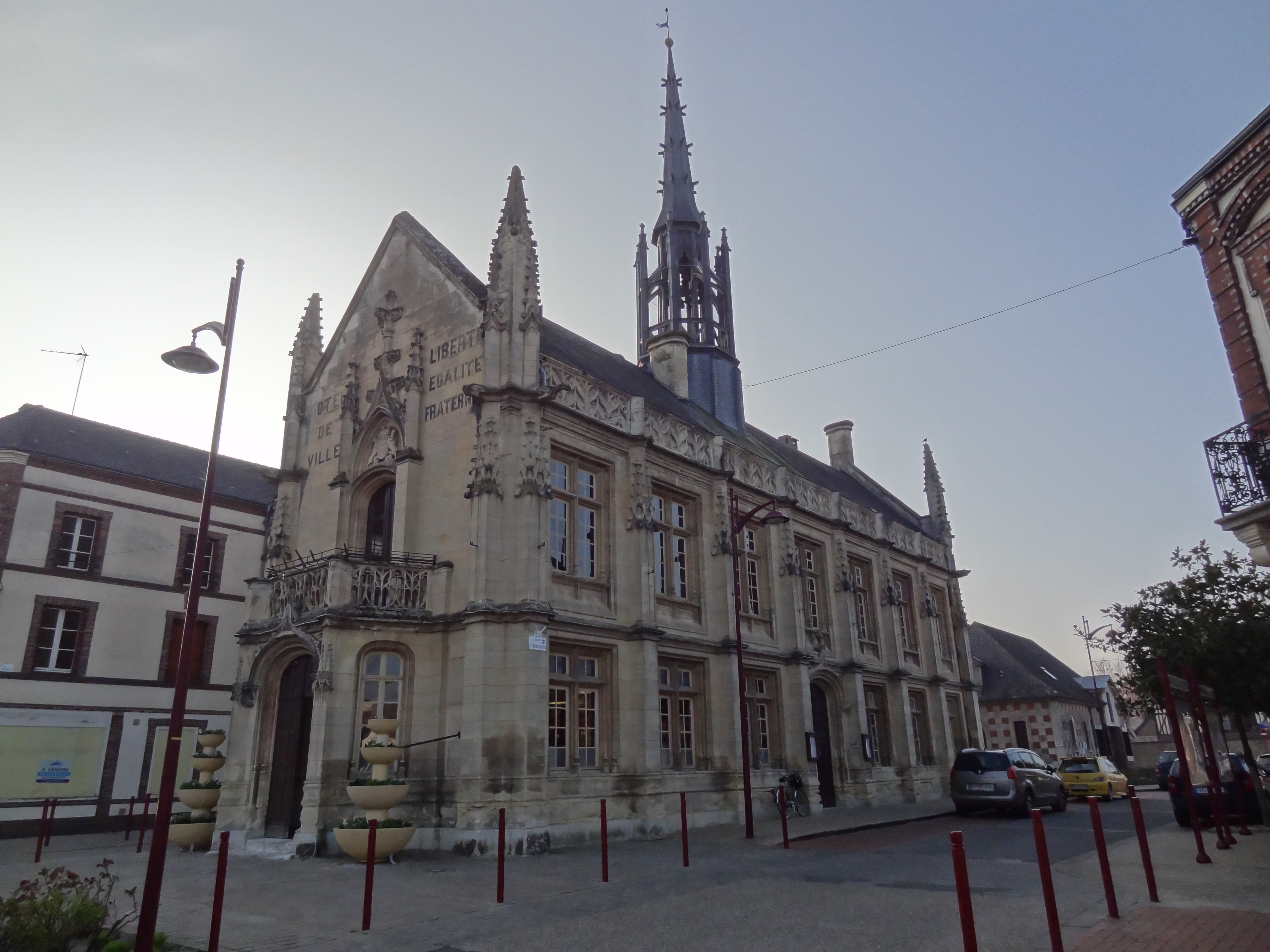 Mairie de Breteuil .